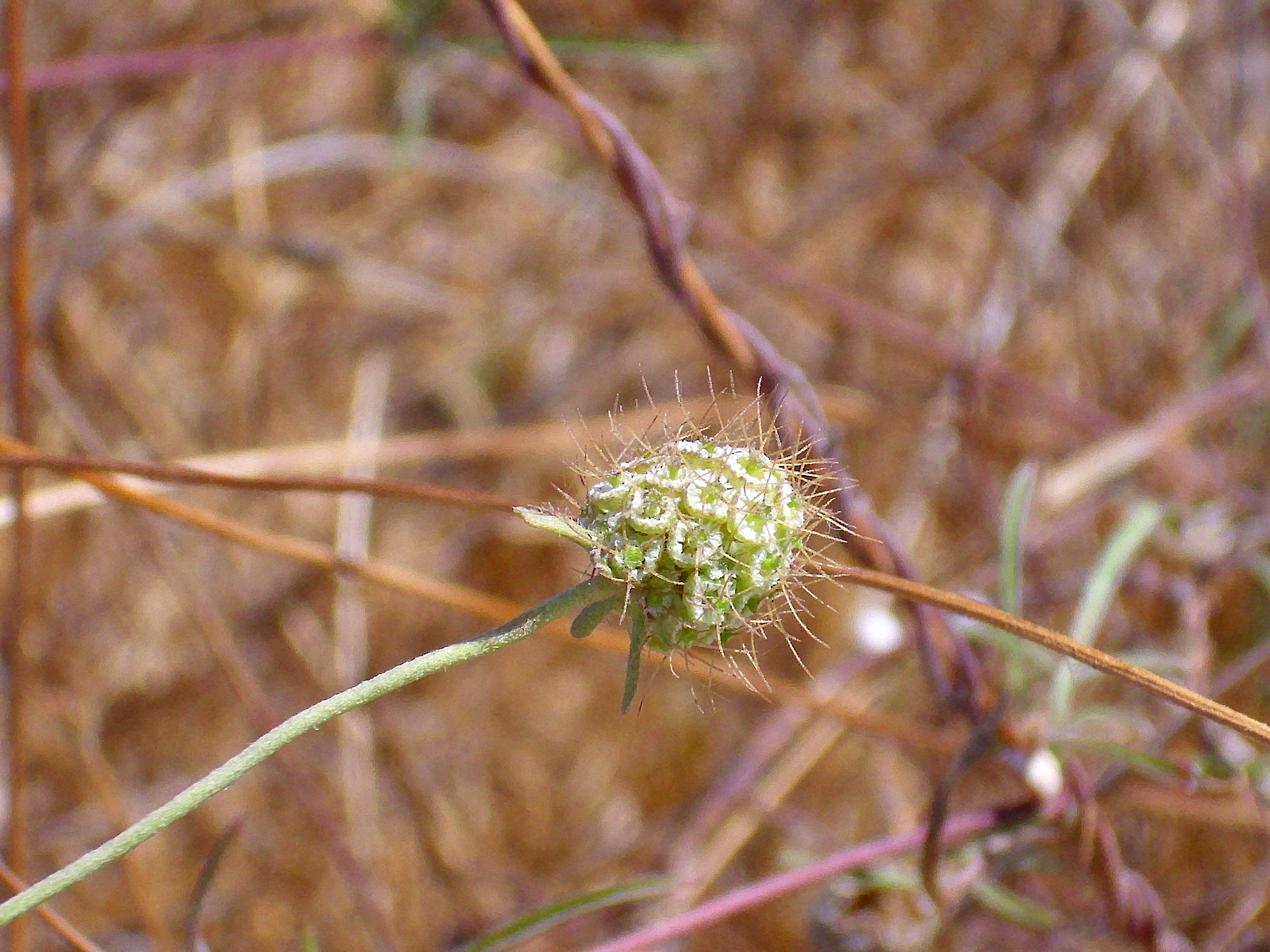 Scabiosa turolensis subsp. turolensis fruits, La Mata, Torrevieja, Alicante, Spain